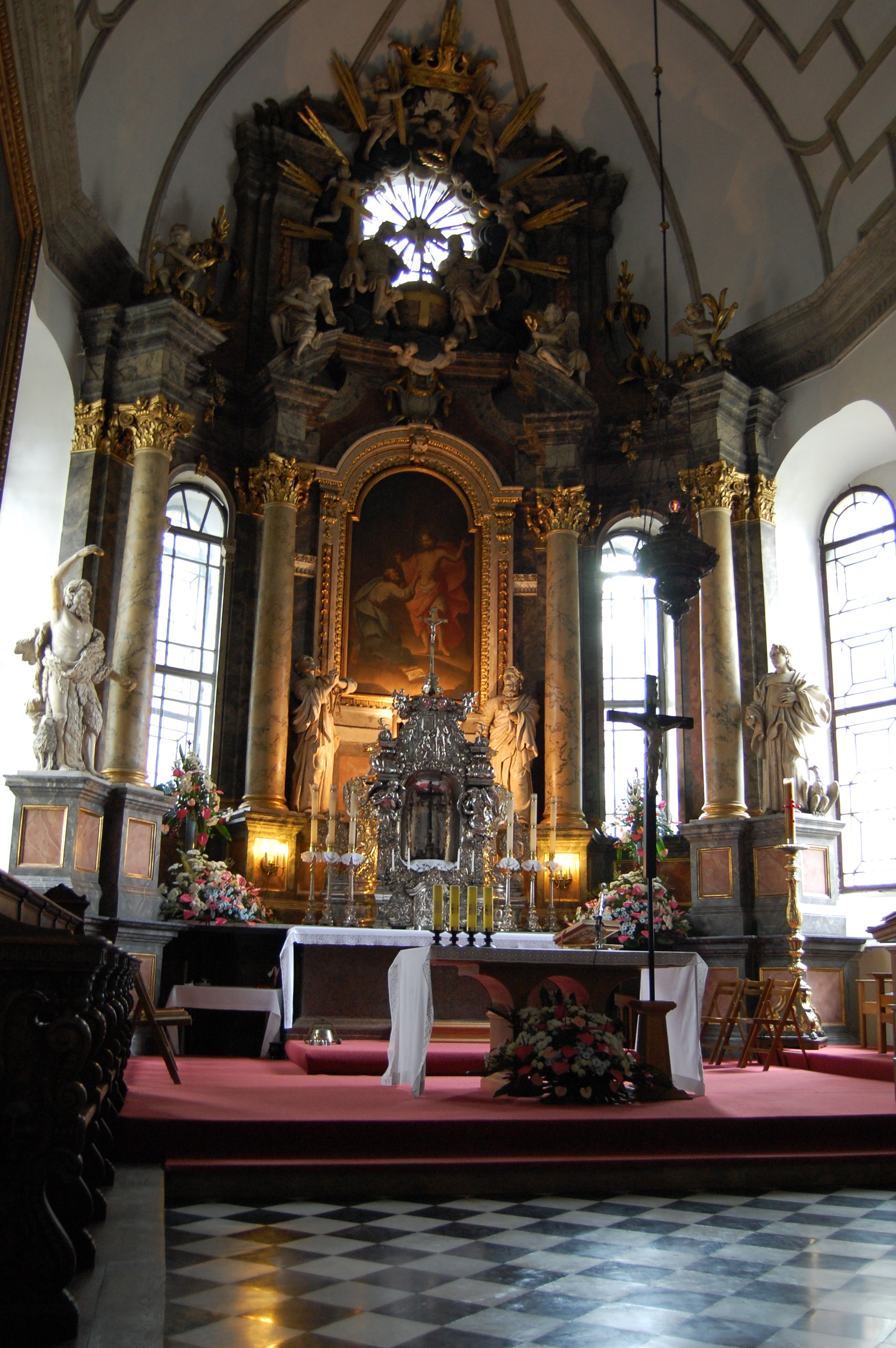 Ołtarz główny w Katedrze w Zamościu.